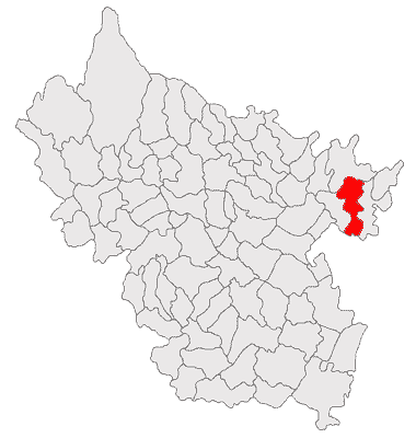 Categorie:Hărţi ale judeţului Buzău